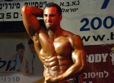 ליבנה שביט בתחרות מר ישראל 2009